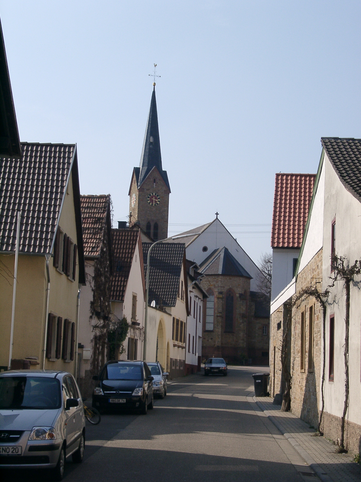 Die Pfarrkirche in Ruppersberg